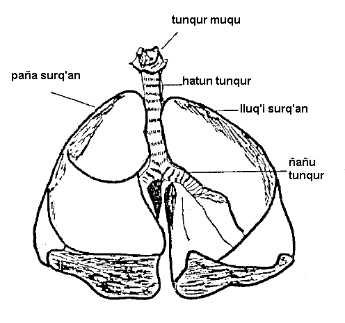 Runa Simi: Runa surq'an